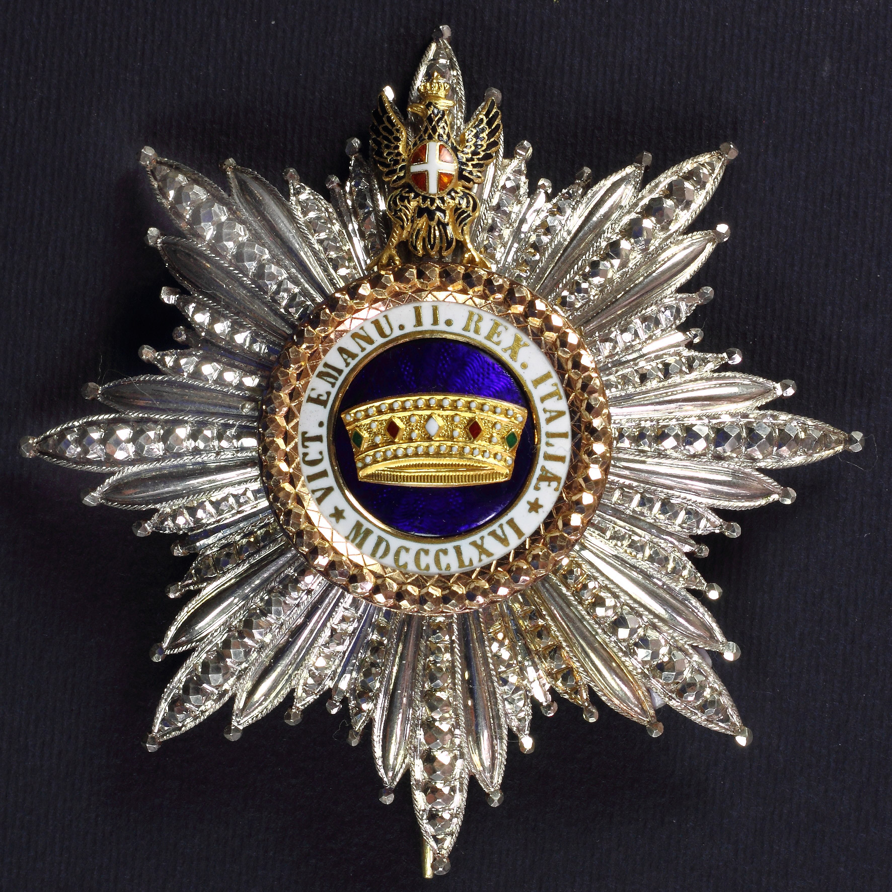 Placca in argento, ordine della Corona d’Italia. Cavaliere di Gran Croce.